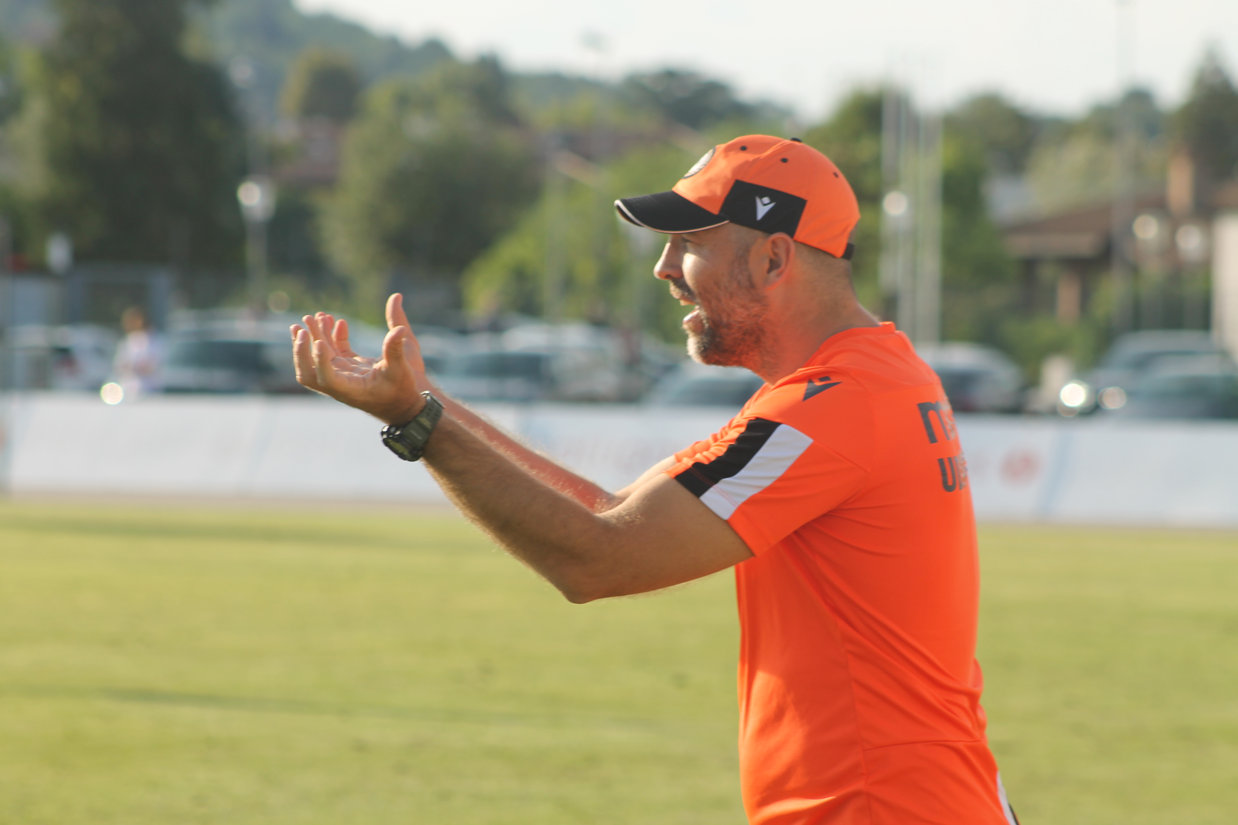 Igor Tudor durante l'amichevole tra Udinese e Cjarlins Muzane